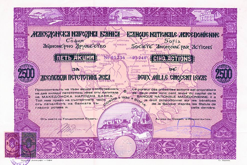 Акция на Македонската народна банка.